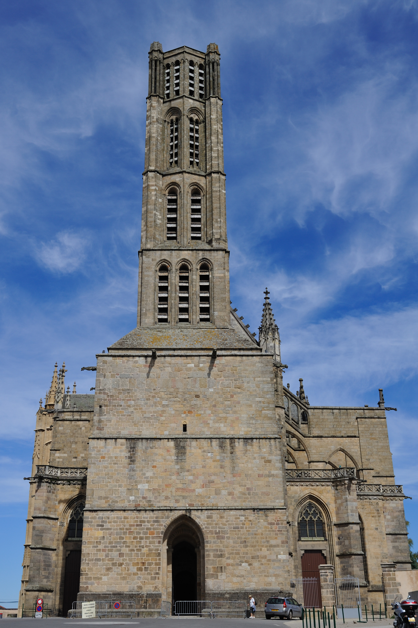 Cathédrale Saint-Étienne, Limoges, Haute-Vienne, France